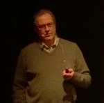 Karl-Erik Michelsen luennoimassa vuonna 2014.